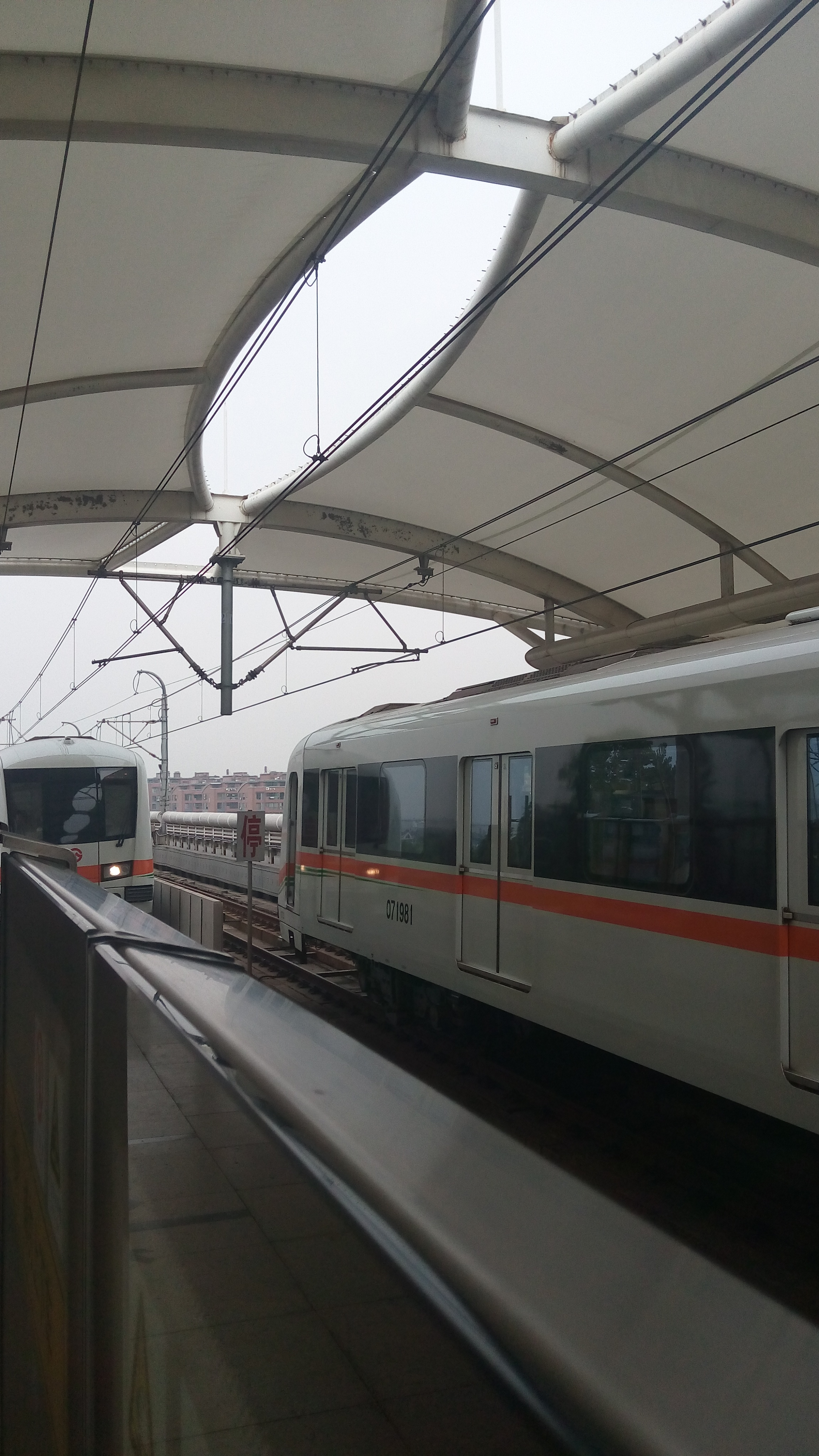 罗南新村站 朝北